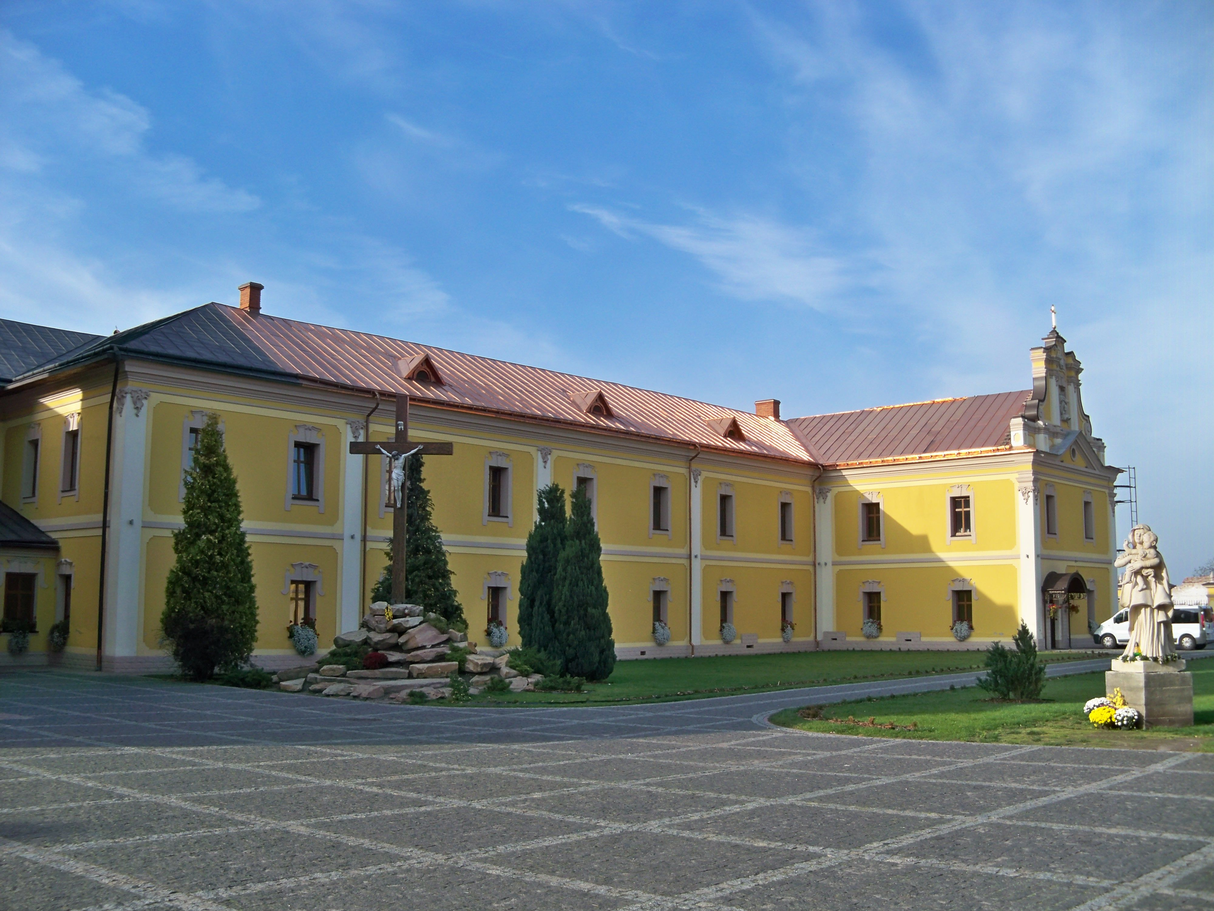 Монастирські келії (мур.), Червоноград, вул.Б.Хмельницького, 21